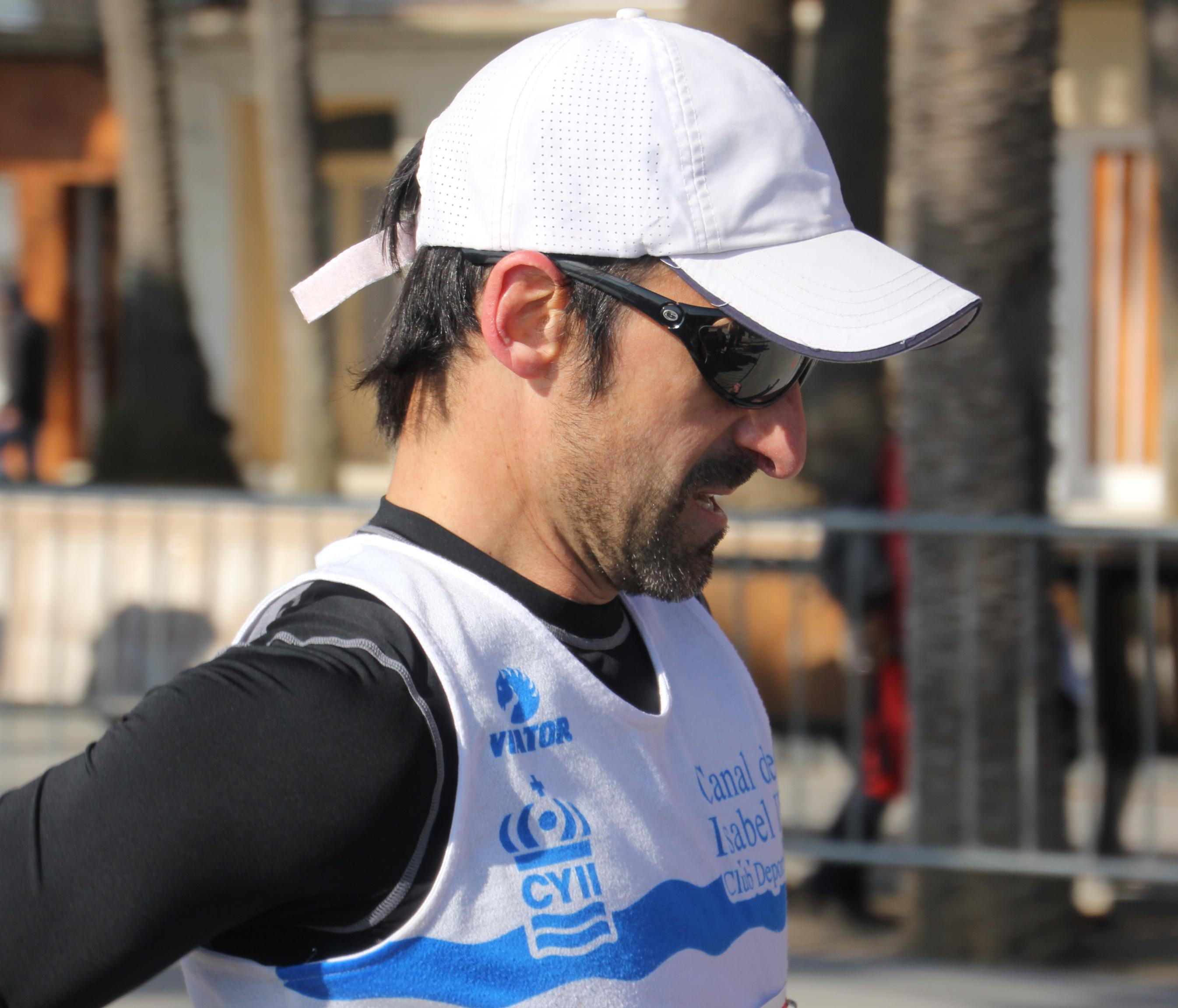 Jesús Ángel García Bragado, marchador español. Ha participado en los seis juegos olímpicos y en diez mundiales de atletismo. Fotografía realizada durante 80 Campeonato de Cataluña Individual de Marcha en Ruta, el 12 de febrero de 2012, en Badalona.